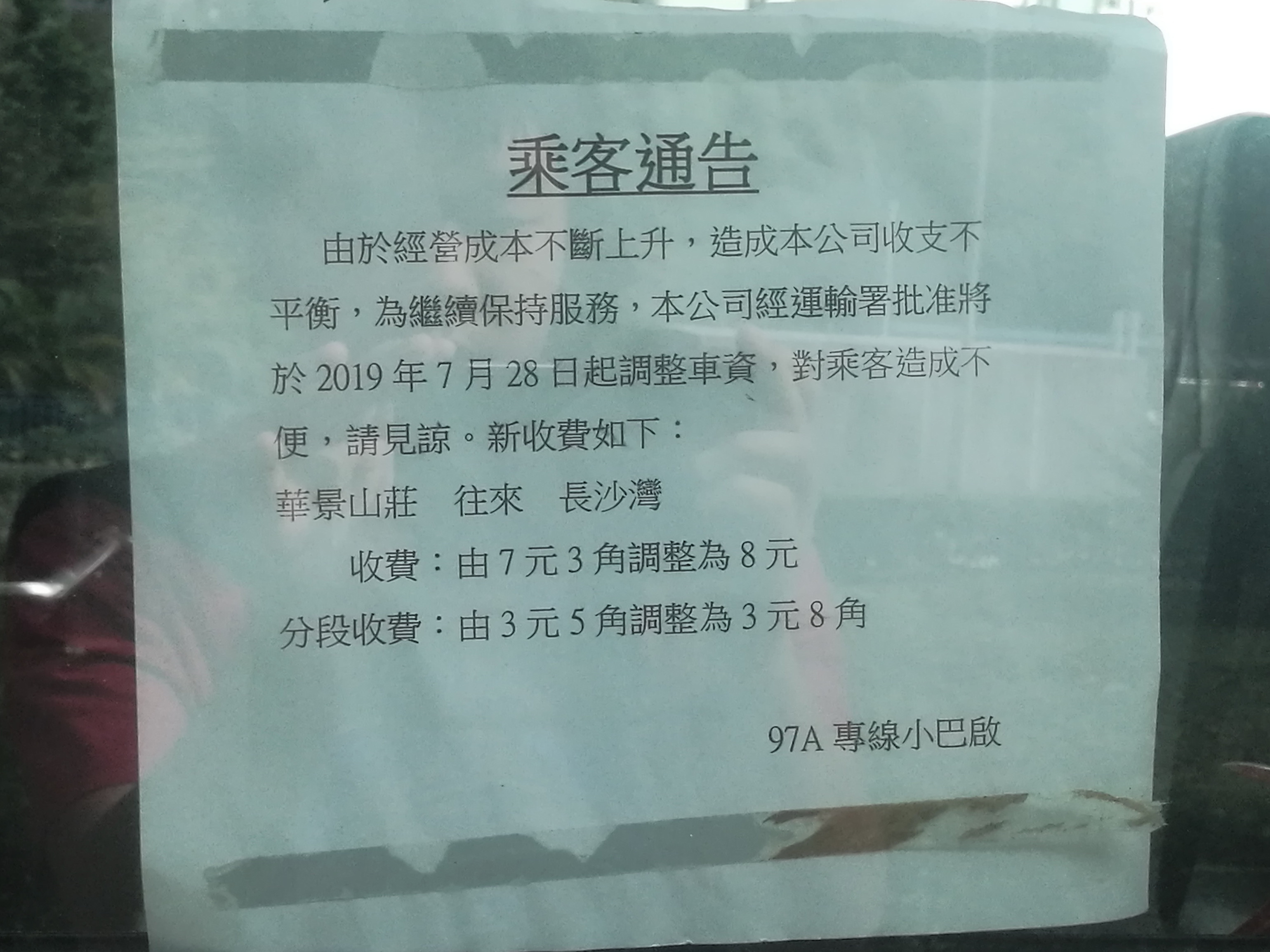 97Anote